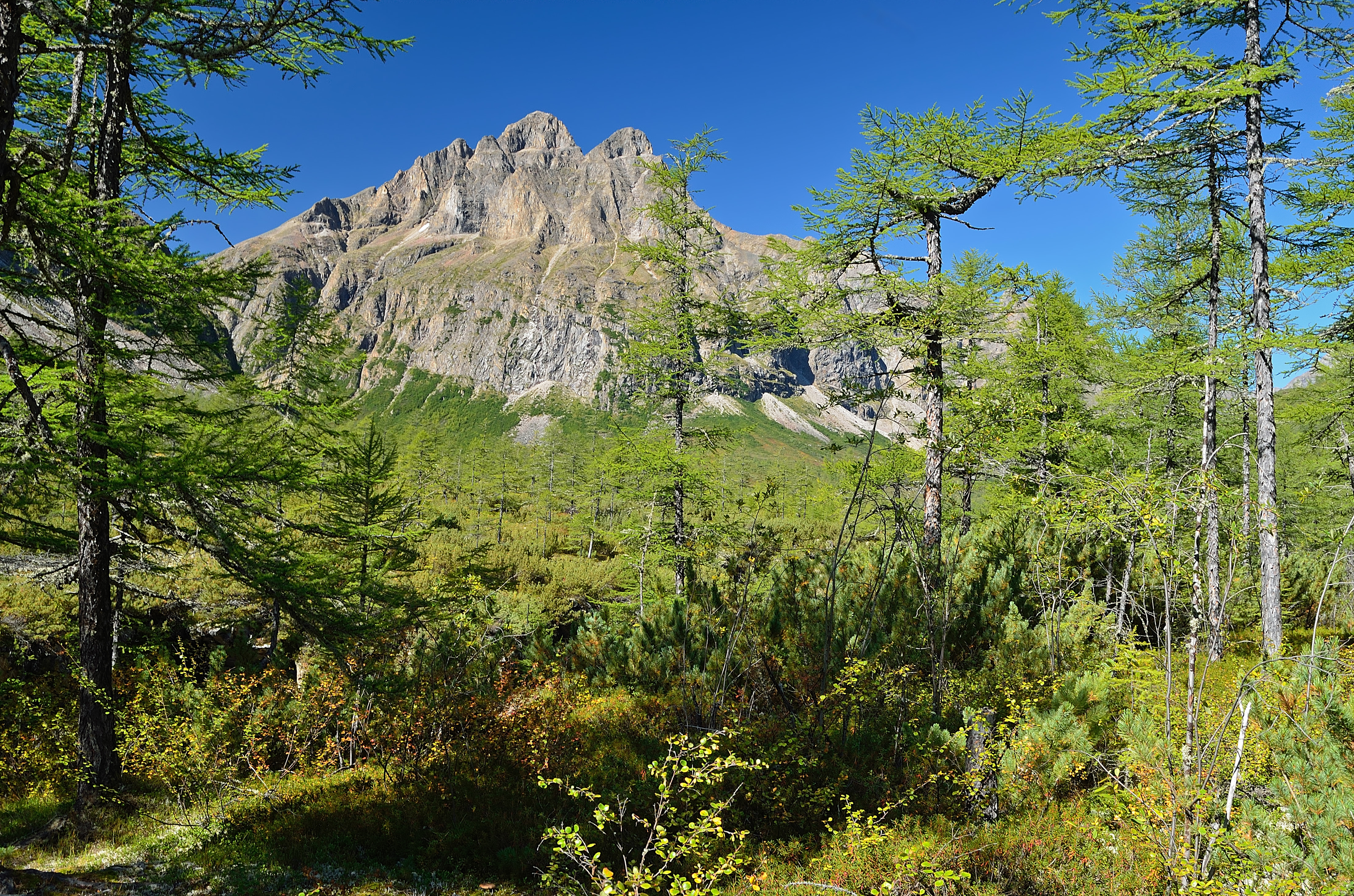 Район, прилегающий к высшей точке Кодарского хребта - пику БАМ (3072 м) This image is related to the protected area of Russia number 7510059